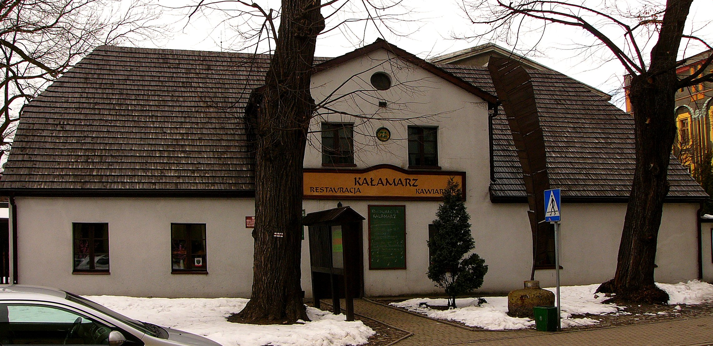 Tarnowskie Góry, ul. Górnicza 7 - budynek mieszkalny, obecnie restauracja-kawiarnia "Kałamarz" (zabytek nr A/624/66)